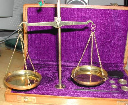 Einfache transportable Balkenwaage mit Gewichtsatz